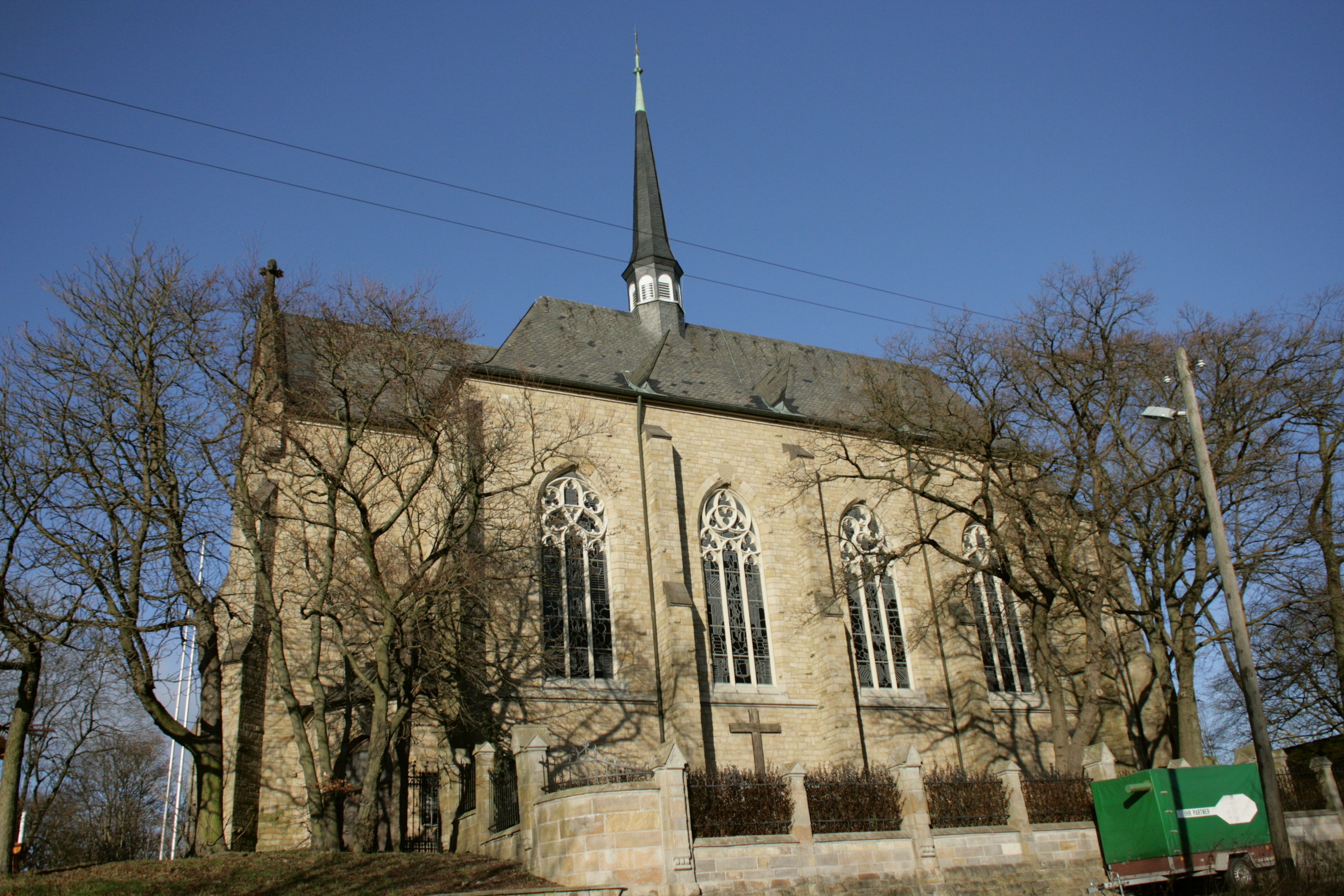 Kamilluskirche in Essen-Heidhausen